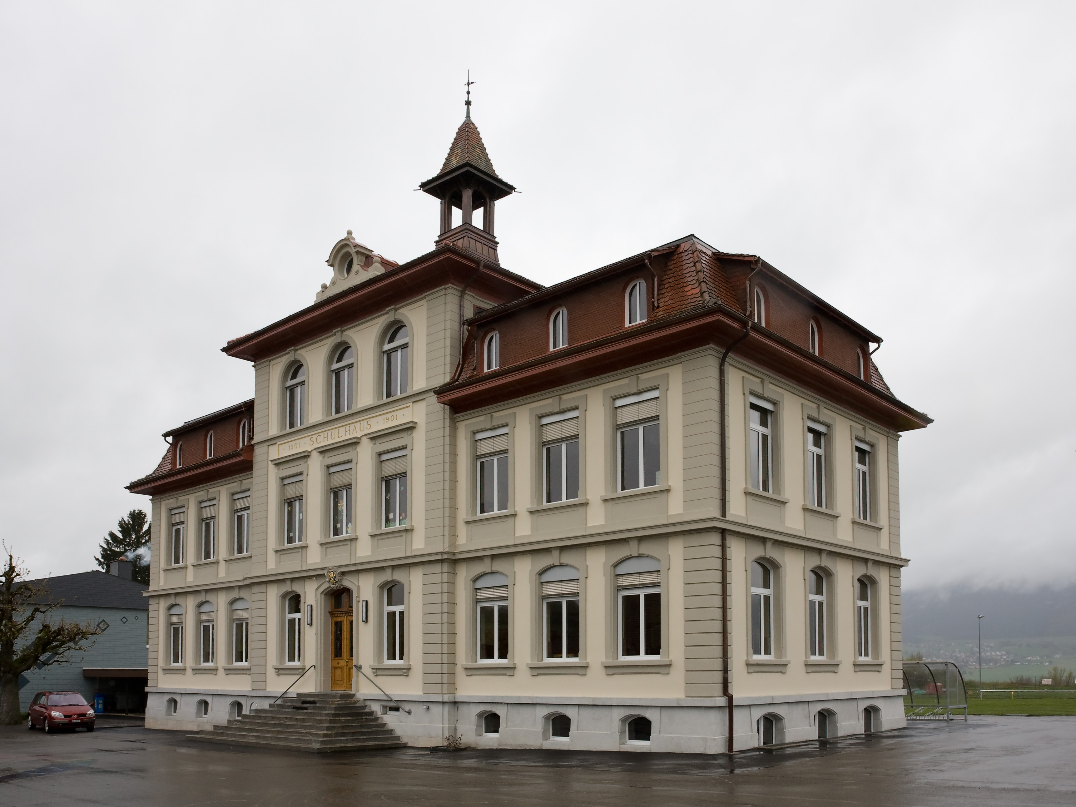 Primarschulhaus von Leuzigen, Kanton Bern, Schweiz